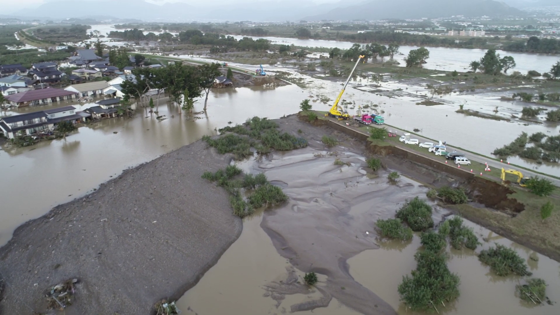 令和元年台風第19号における長野県長野市大字穂保地区における千曲川の破堤箇所 en:1+The bank of the Chikuma River in the Hoho area, Nagano City, Nagano Prefecture, in the 19th era of the Typhoon No. 1